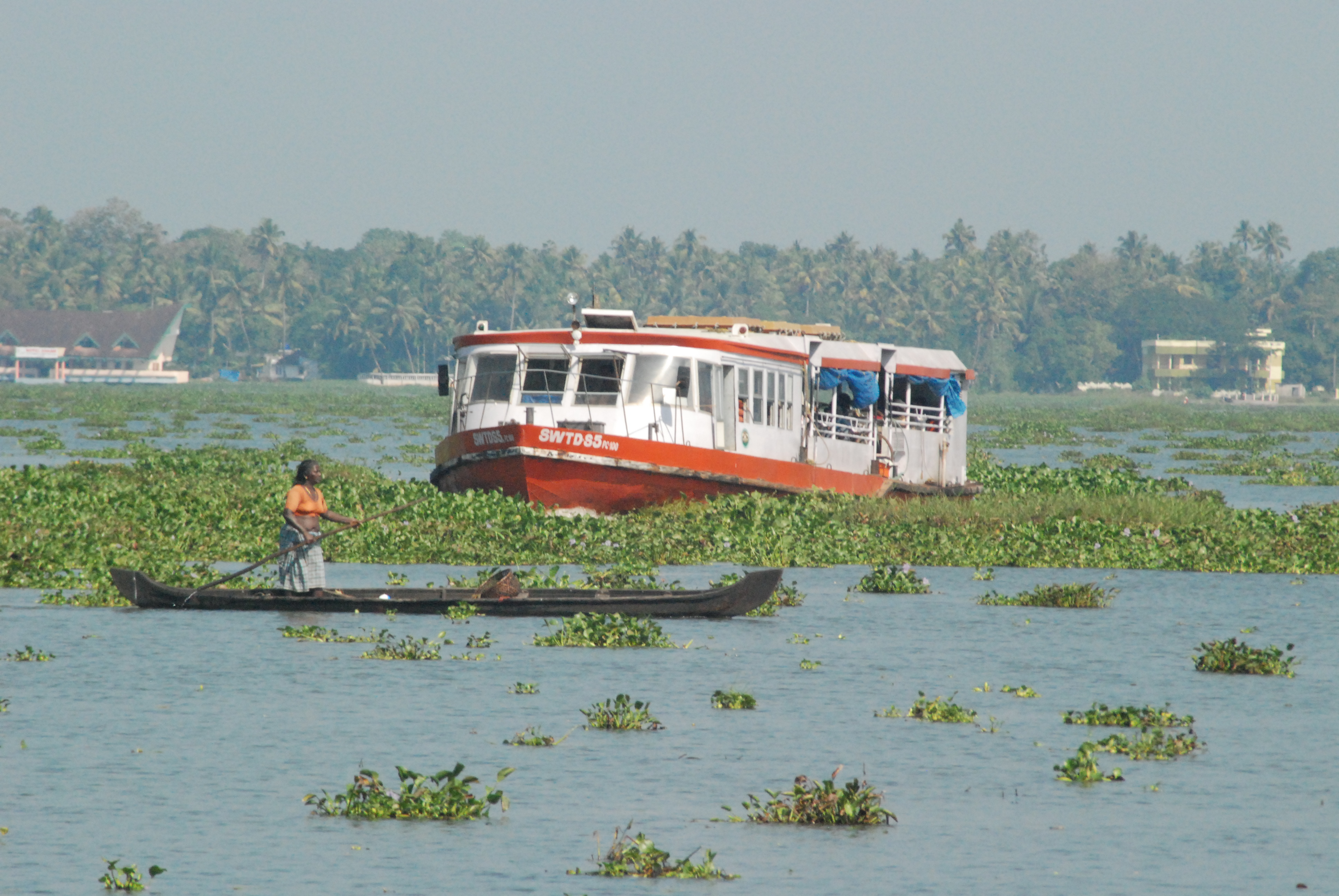 വൈക്കം കായലിൽ,വള്ളക്കാരിയും ബോട്ടും